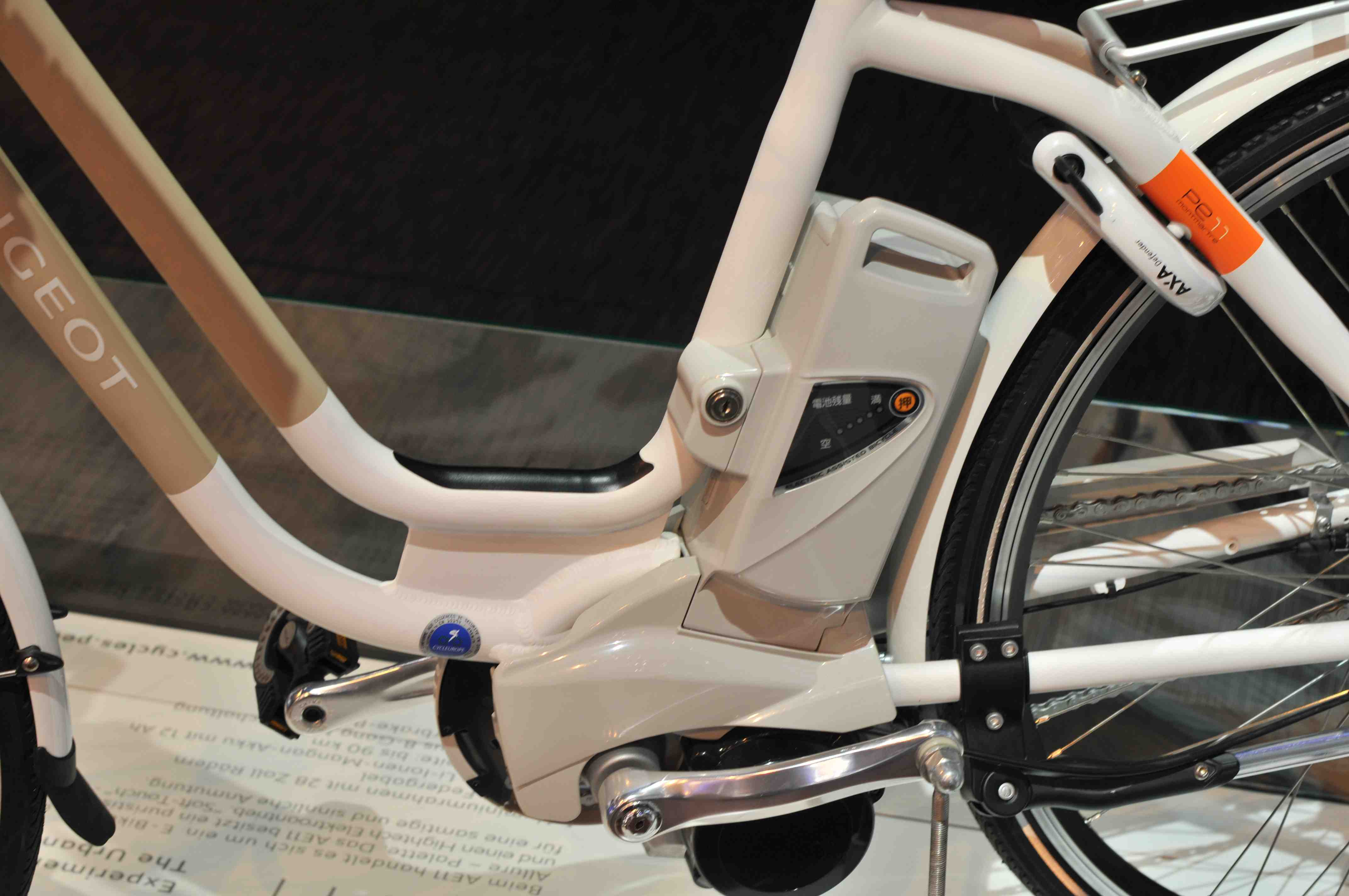 IAA 2011 - Internationale Automobilausstellung in Frankfurt/Main.